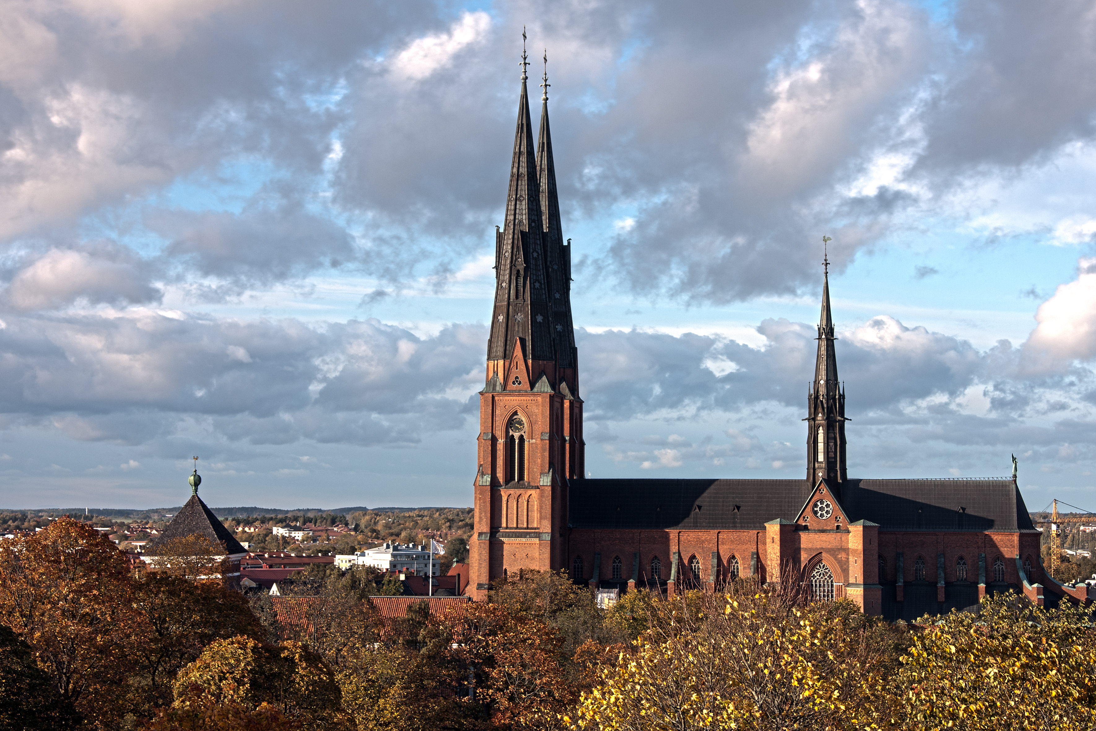 Uppsala domkyrka fotograferad från Gunillaklockan i oktober 2011. HDR från tre exponeringar.